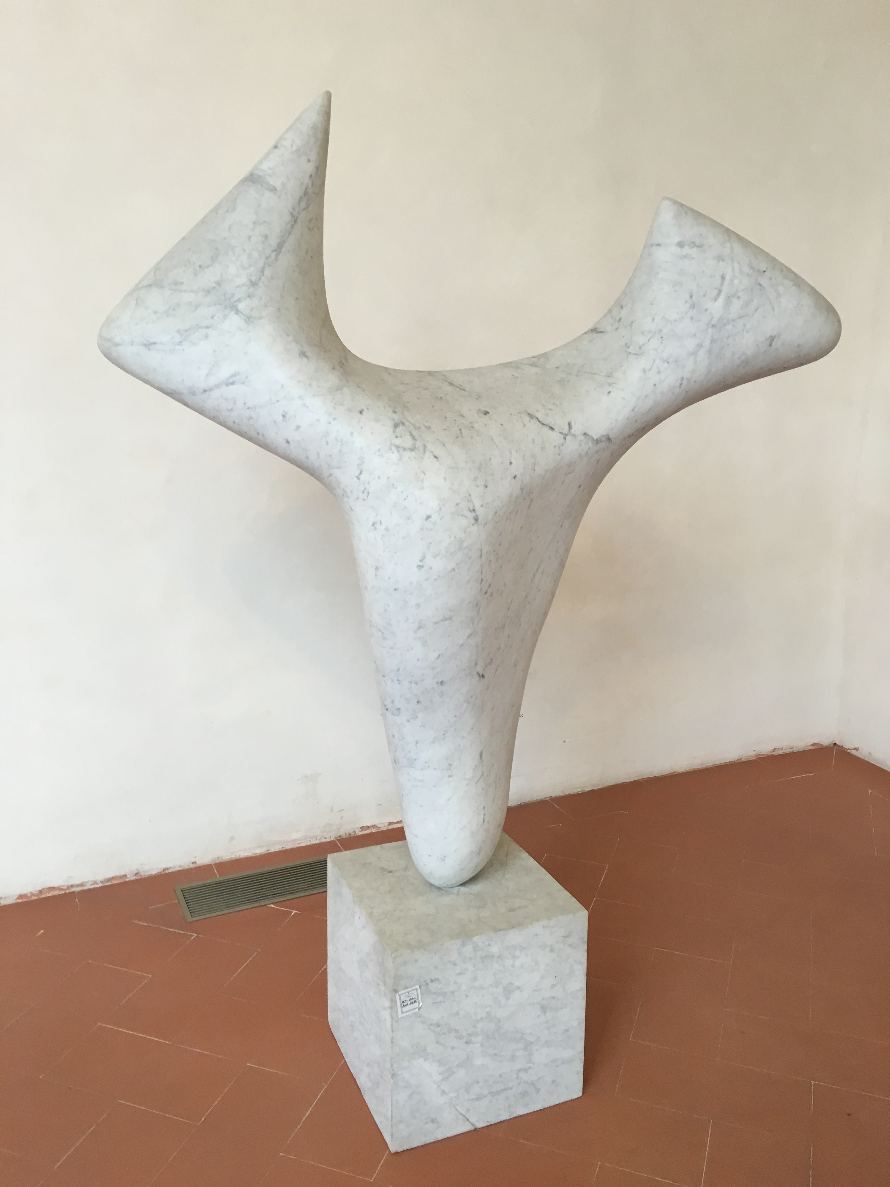 Alberto Viani "Il pastore dell'essere" 1963